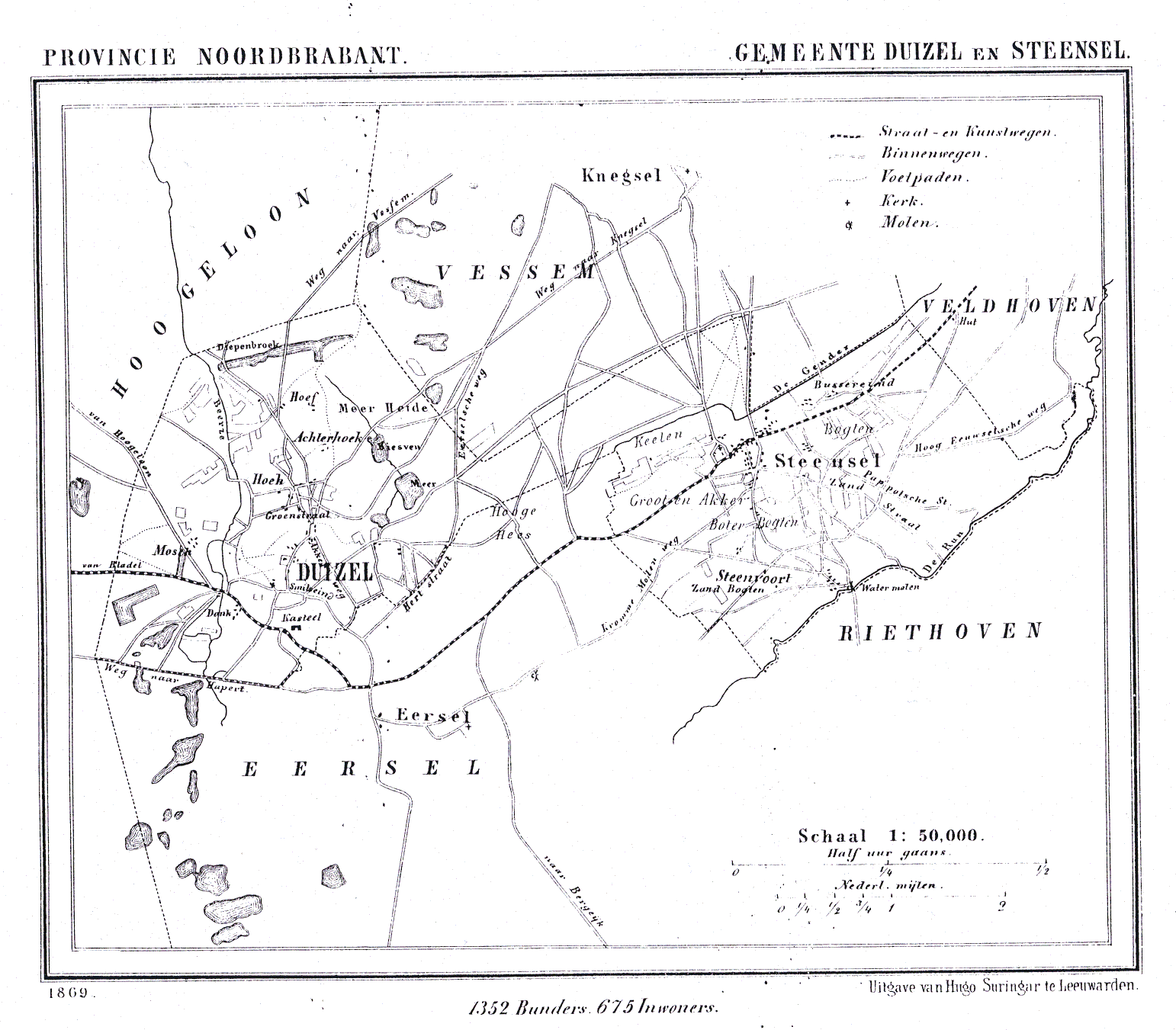 Gemeente Duizel en Steensel, Noord-Brabant, Nederland (deze voormalige gemeente is nu onderdeel van de Gemeente Eersel). Municipality of Duizel and Steensel, North Brabant, Netherlands (this former municipality is now part of the municipality of Eersel).